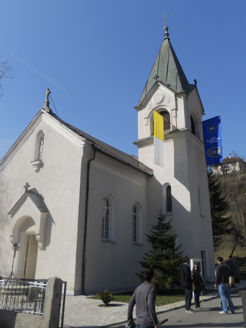 Zupna crkva povodom 100. godisnjice zupe